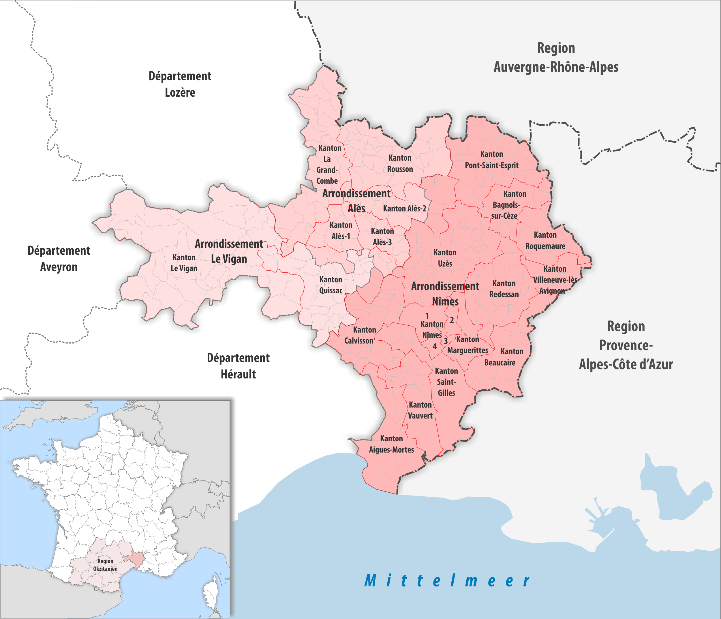 Gemeinden, Kantone und Arrondissemente im Departement Gard